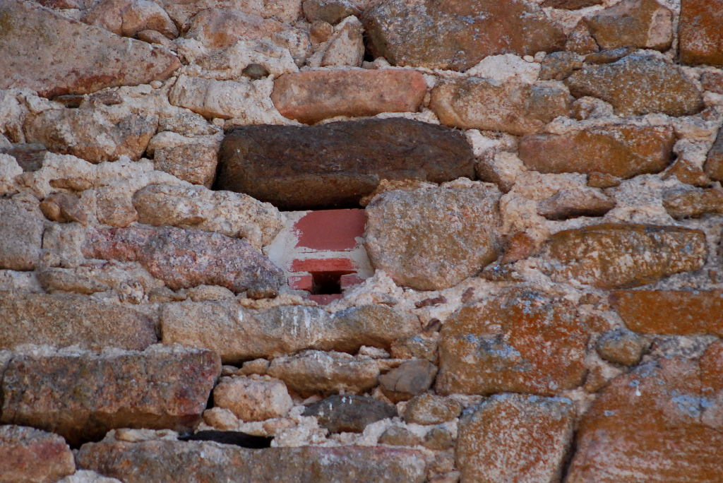 Nido acondicionado de cernícalo primilla (Falco naumanni) en la igl. de Saucedilla